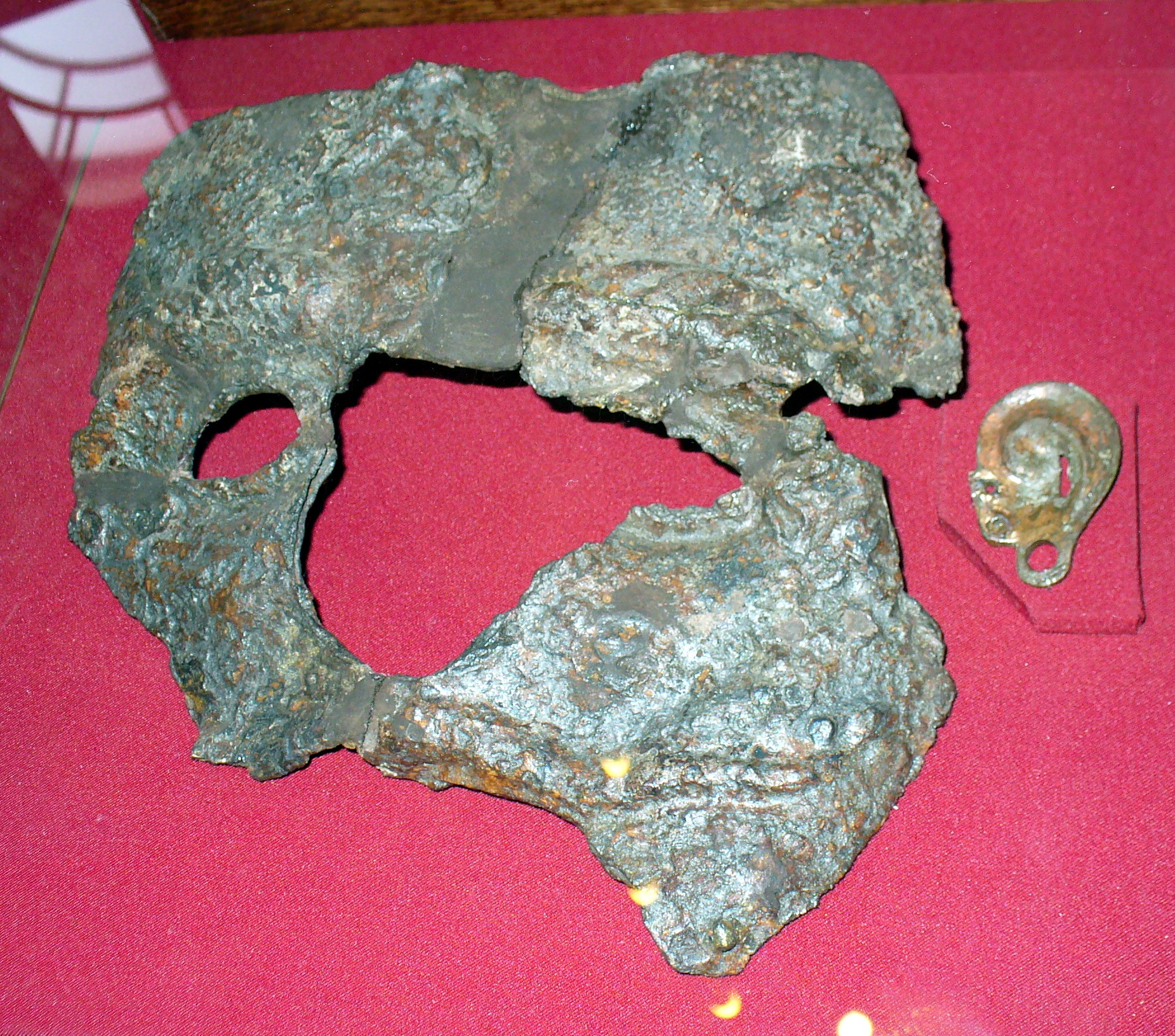 Личина из Херсонеса, около XIV века.